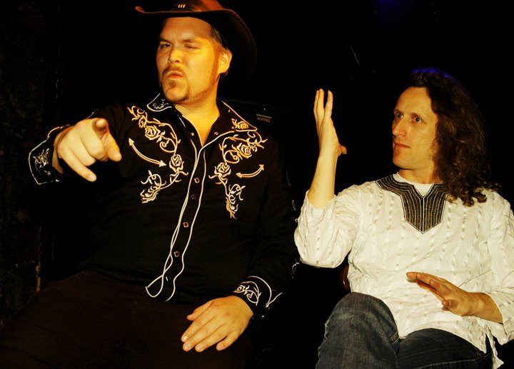 Låtskriverne fra bandet Neograss